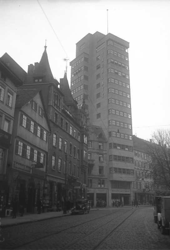 Hochhaus Tageblatt in Stuttgart